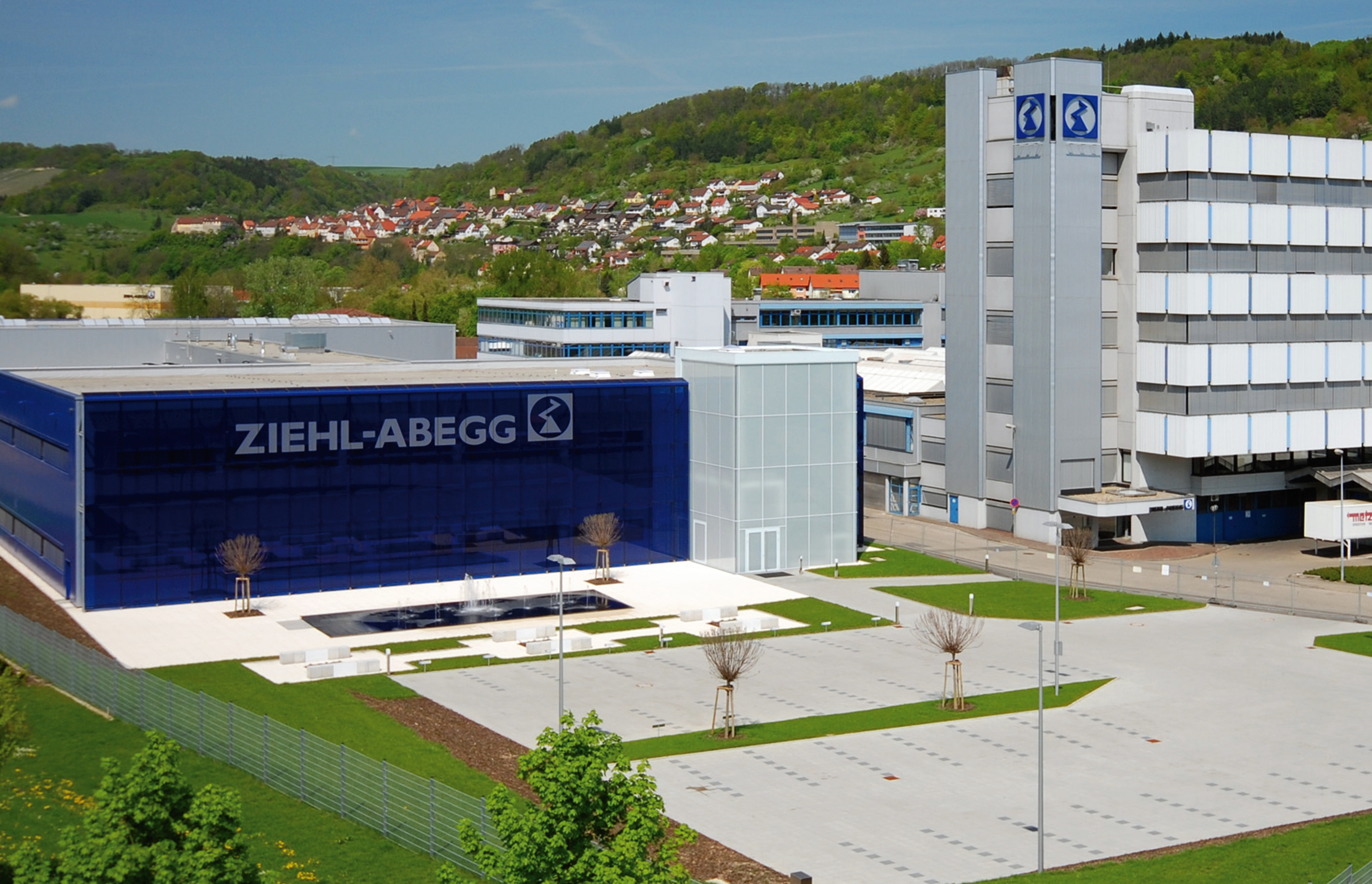 Ziehl-Abegg - Standort Künzelsau